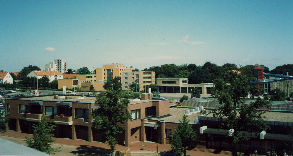 Stadtzentrum Langenhagen: Schornsteinfegerschule, Feuerwache, Schwimmbad und im Vordergrund ein Teil des Postgebäudes.